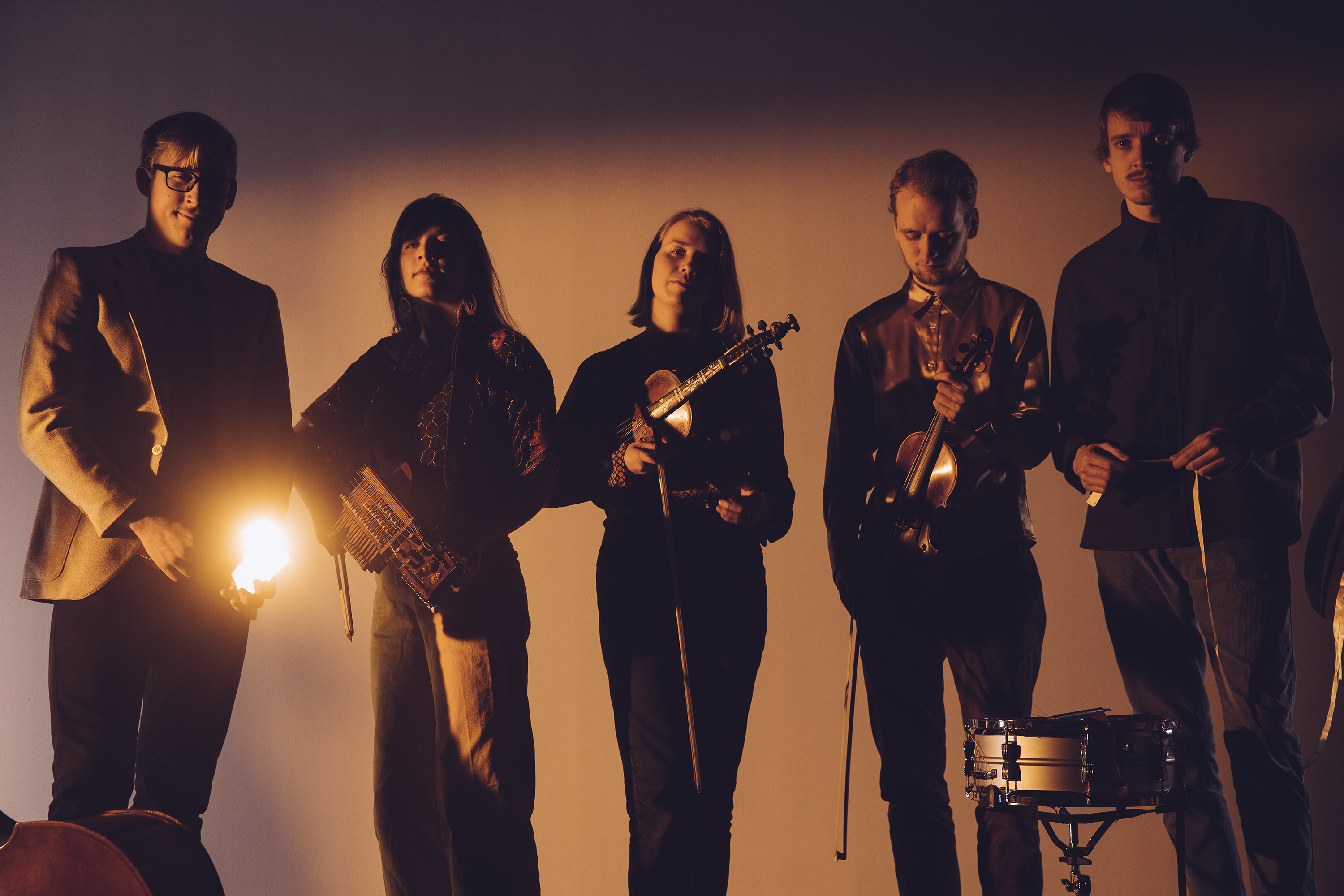 Morgonrode - pressefoto